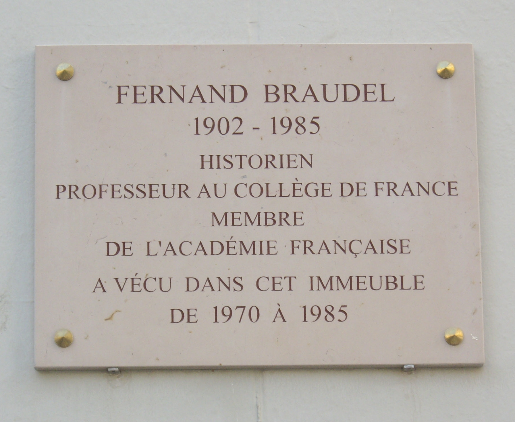 Plaque apposée au n° 59 de la rue Brillat-Savarin, Paris 13e, où vécut l'historien Fernand Braudel (1902-1985) de 1970 à 1985.